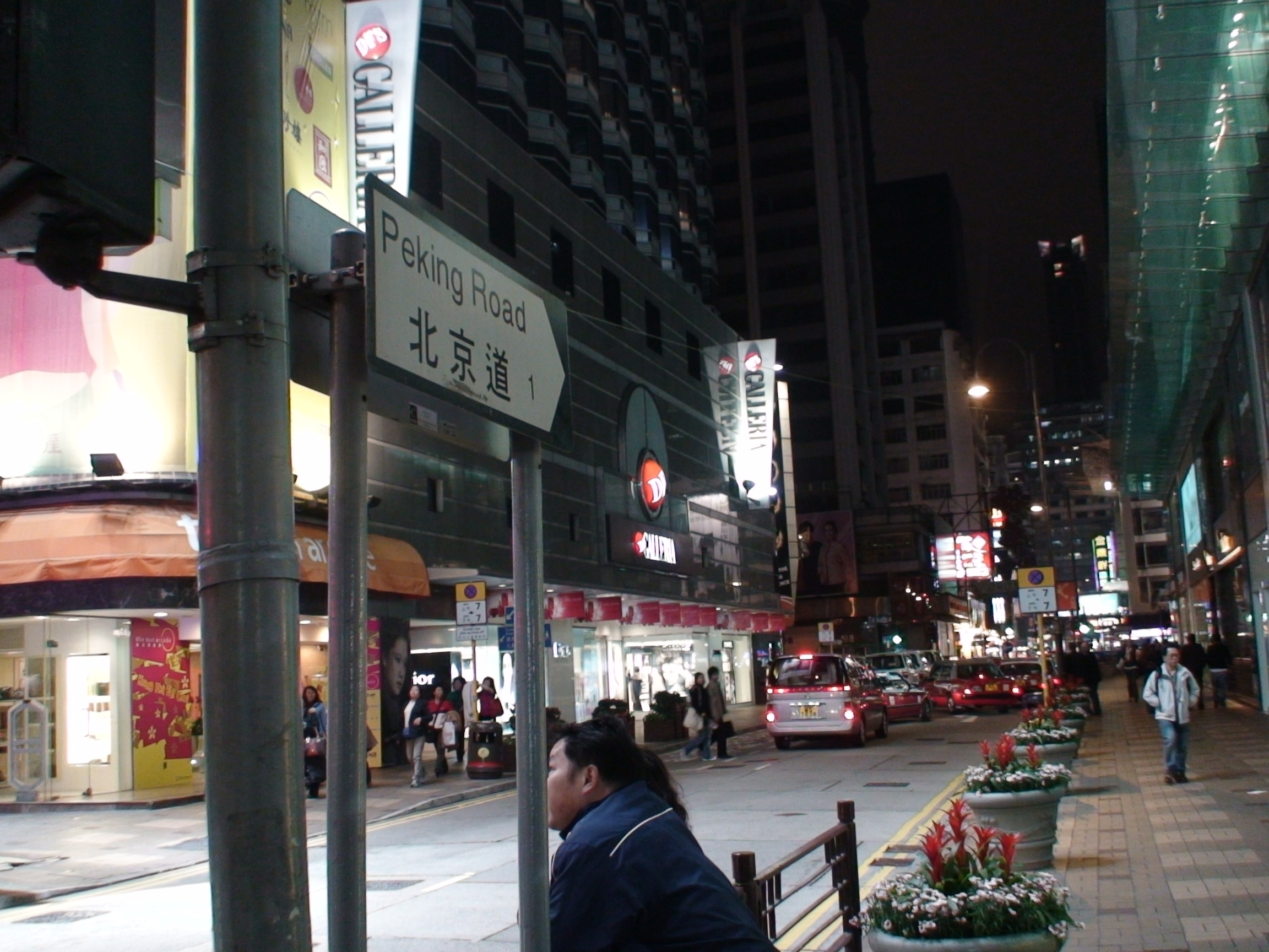 Peking Road -Tsim Sha Tsui (北京道) in Kowloon Hong Kong.